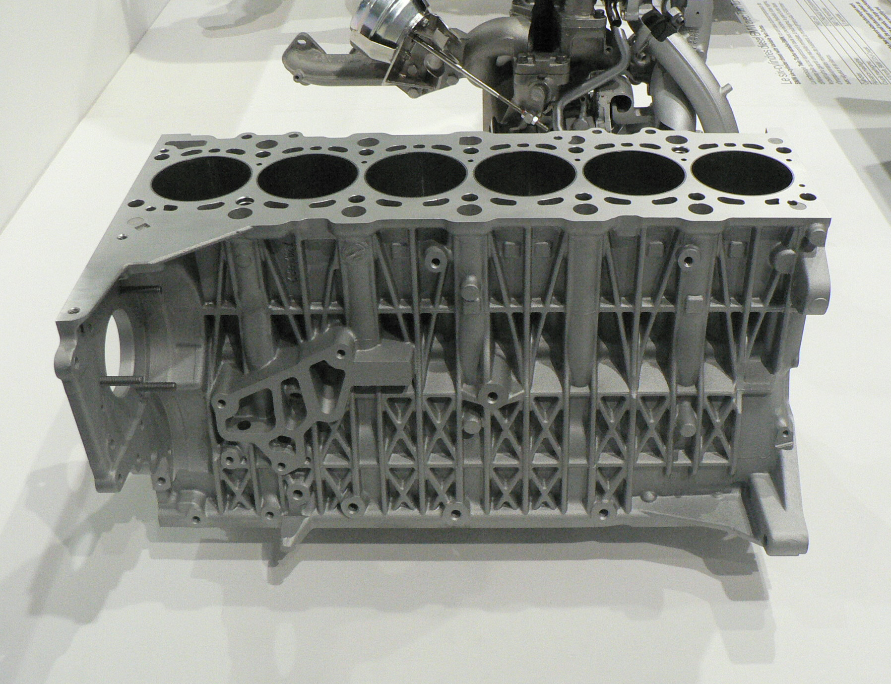 Mondial de l'automobile, Paris 2006